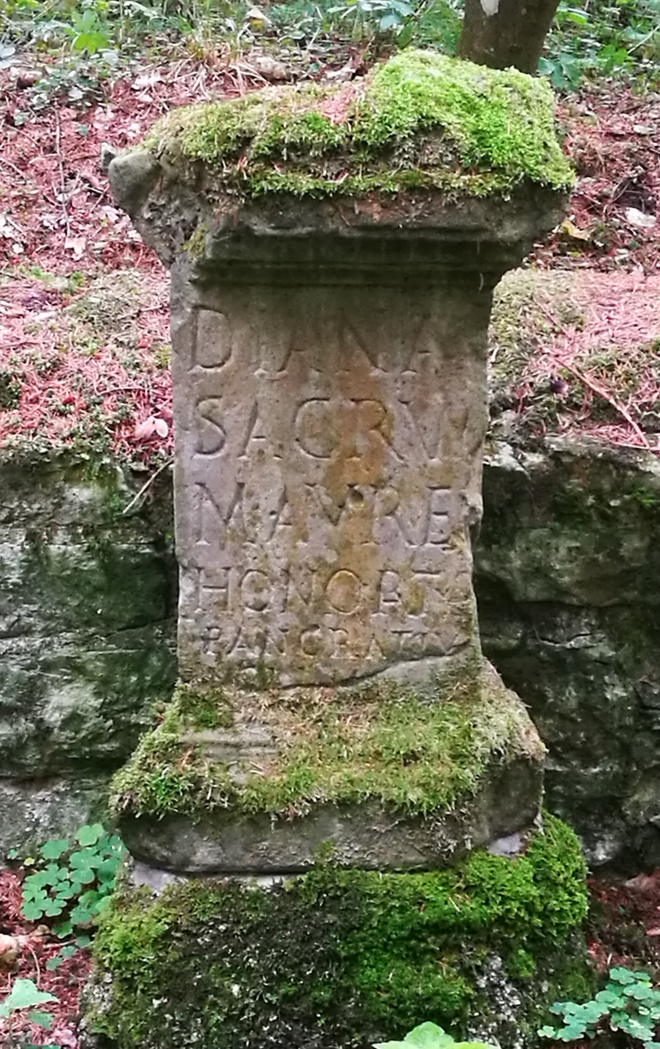 Deutschland (D) - Baden-Württemberg (BW) - Landkreis Sigmaringen (SIG) - Meßkirch: Villa Rustica - Weihestein